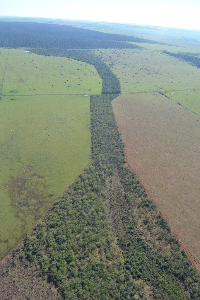 Arquivo IPÊ/Laury Cullen Jr